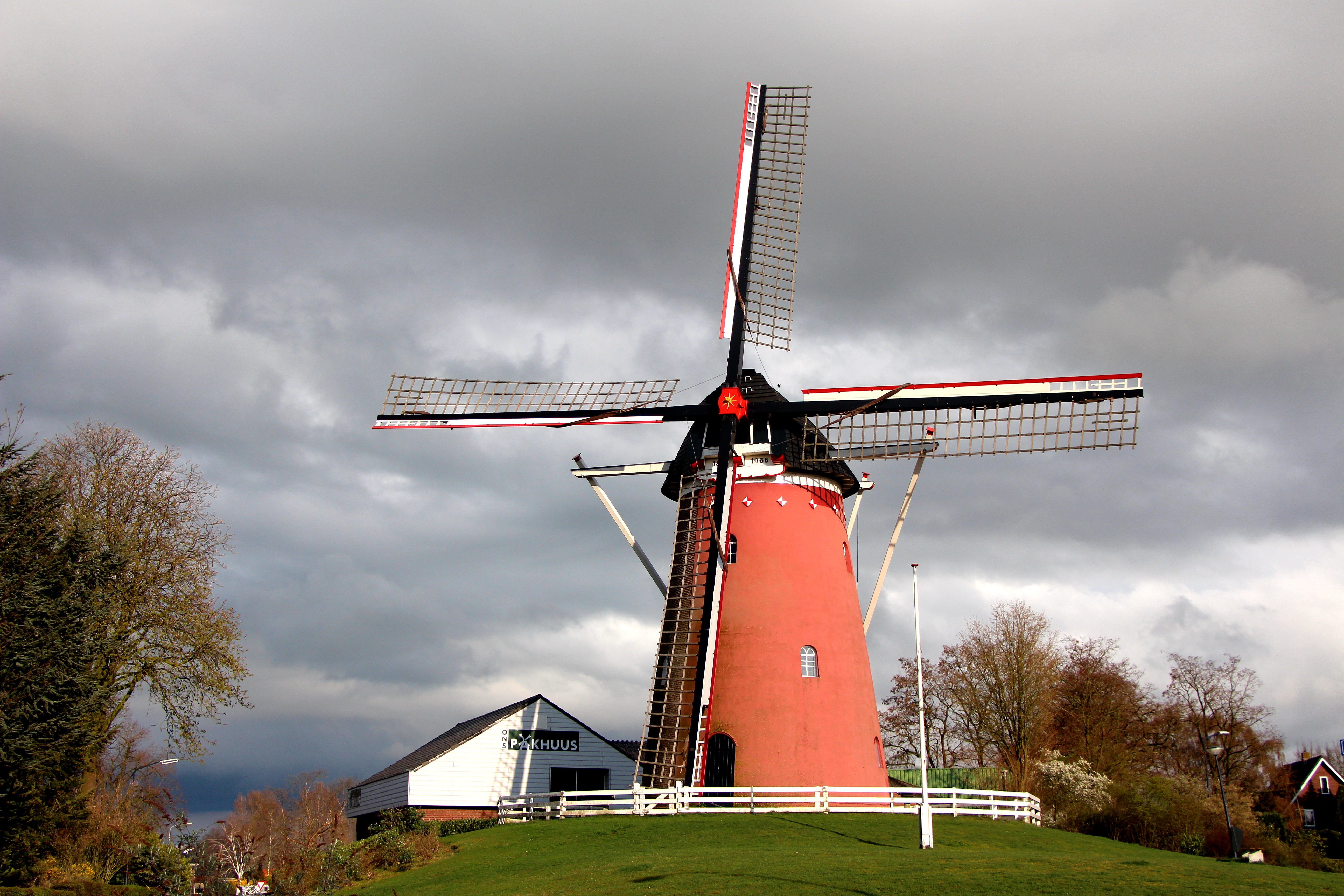 Gerritsens Molen, Silvolde (Oude IJsselstreek), vanuit het Zuid-Westen.